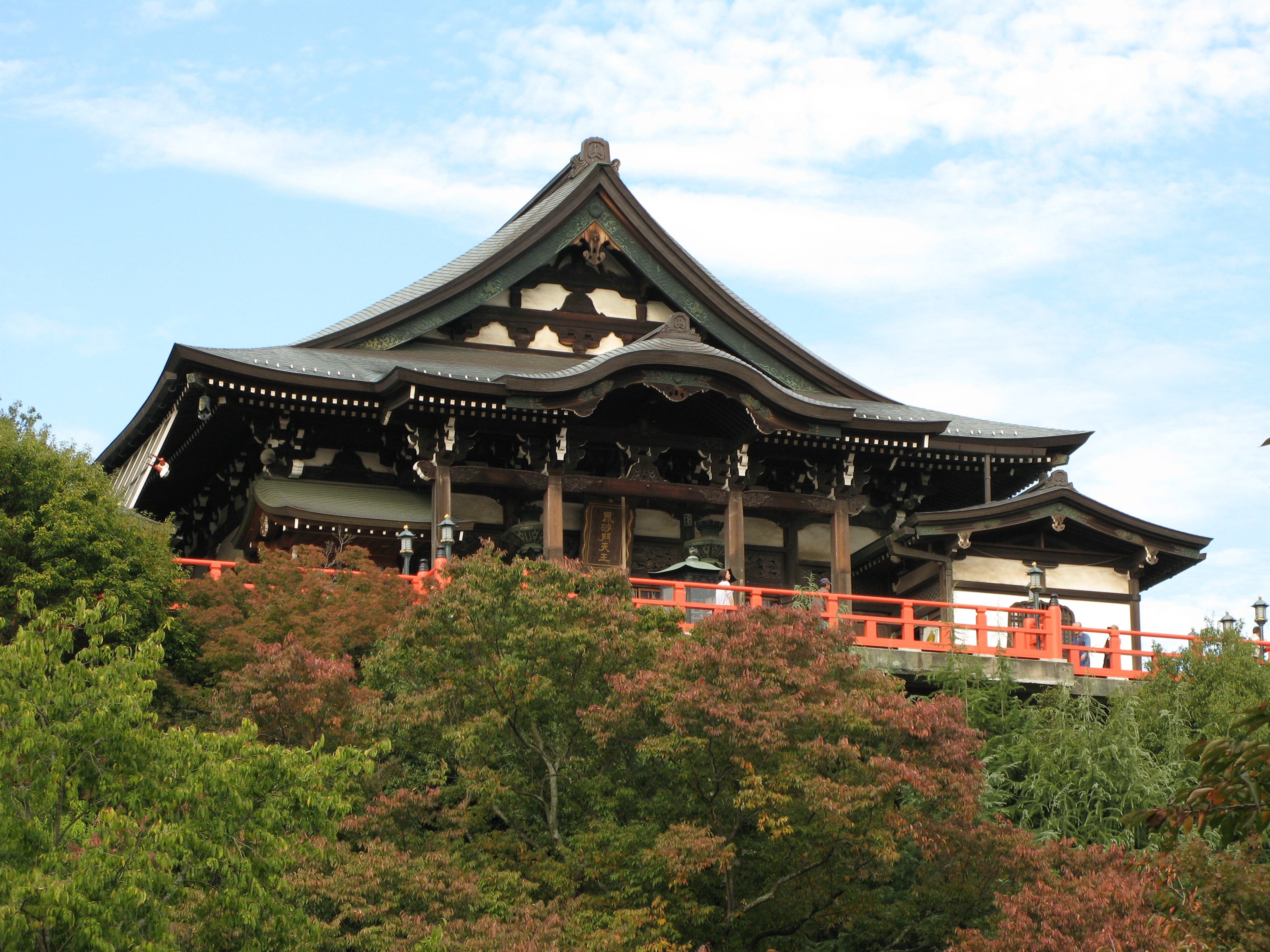 Chyogosonshi-ji, Nara, Japan